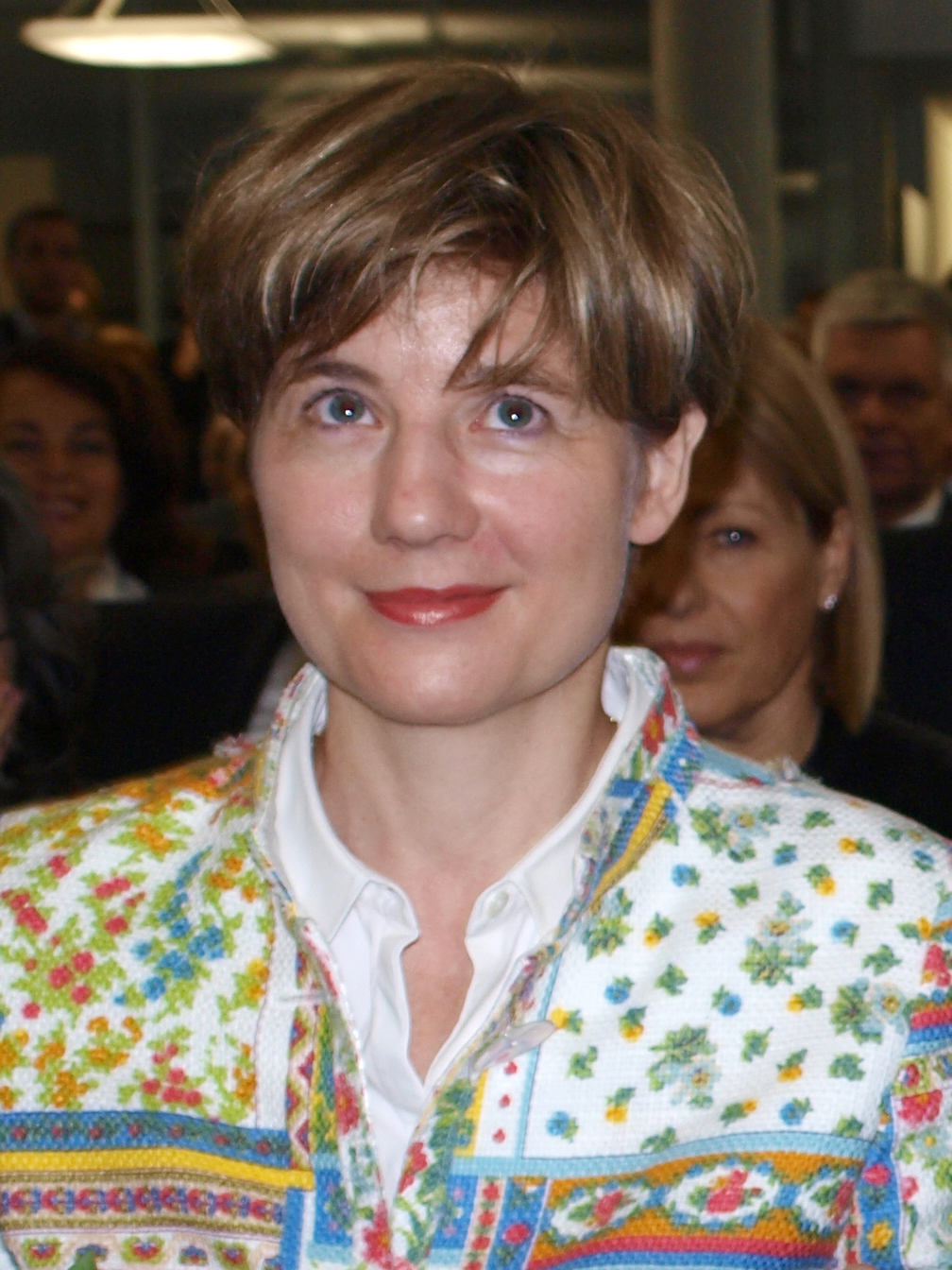 Maike Richter-Kohl im Institut für Jüdische Studien in Heidelberg am 30. September 2009